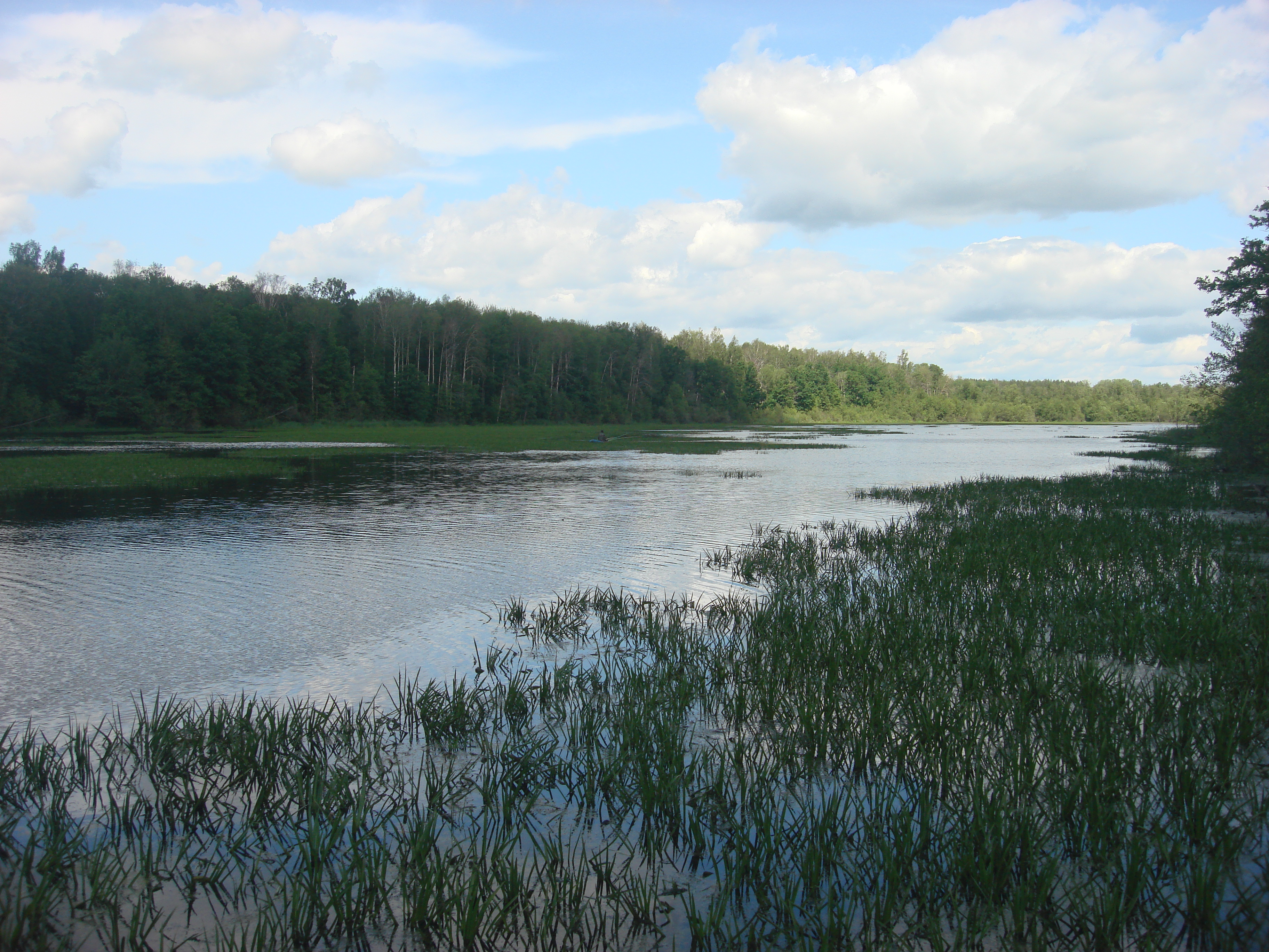 Кумашкинский заказник, Шумерлинский район This image is related to the protected area of Russia number 2110060